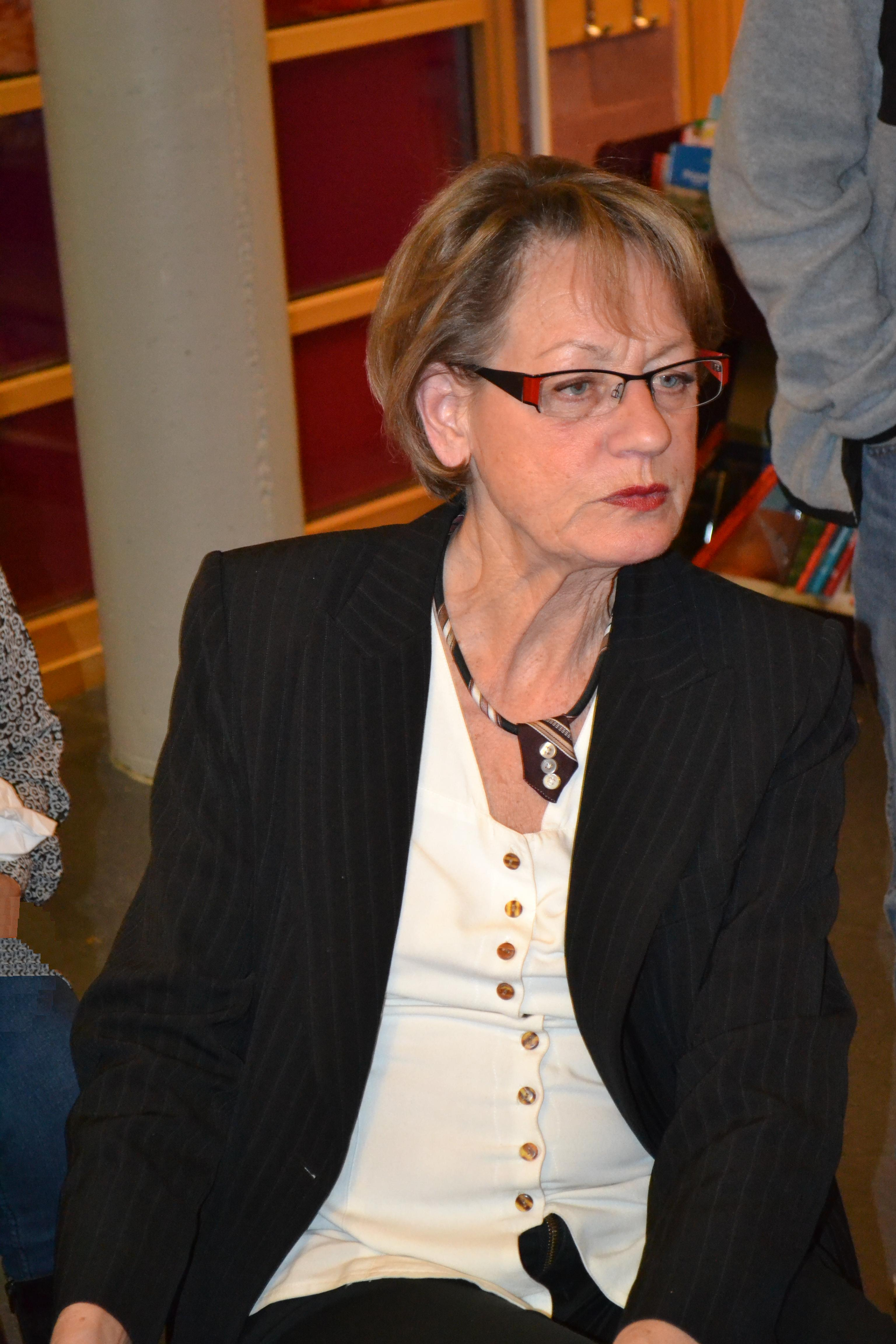 Gudrun Schyman i en paneldebatt om jämställdhet i Hallunda bibliotek Unknown